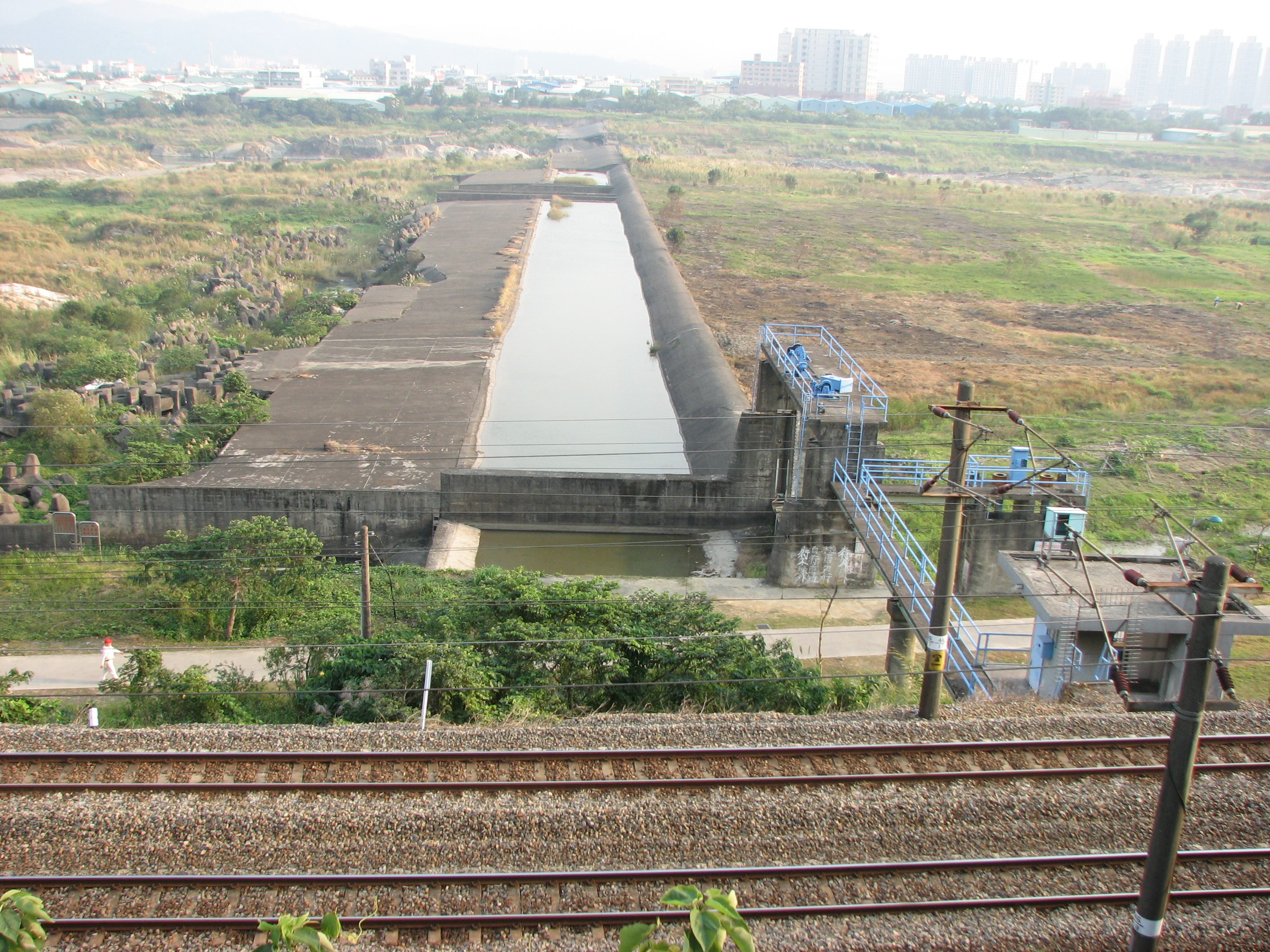 毀壞的後村堰，位於樹林與鶯歌交界的大漢溪上